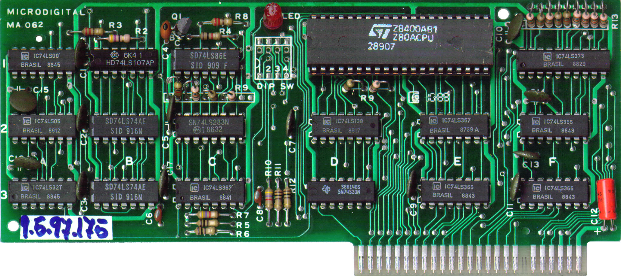 Placa que coloca um microprocessador Z80 como UCP do TK3000 IIe, deixando-o compatível com o sistema operacional CP/M. É cópia da placa Softcard da Microsoft.